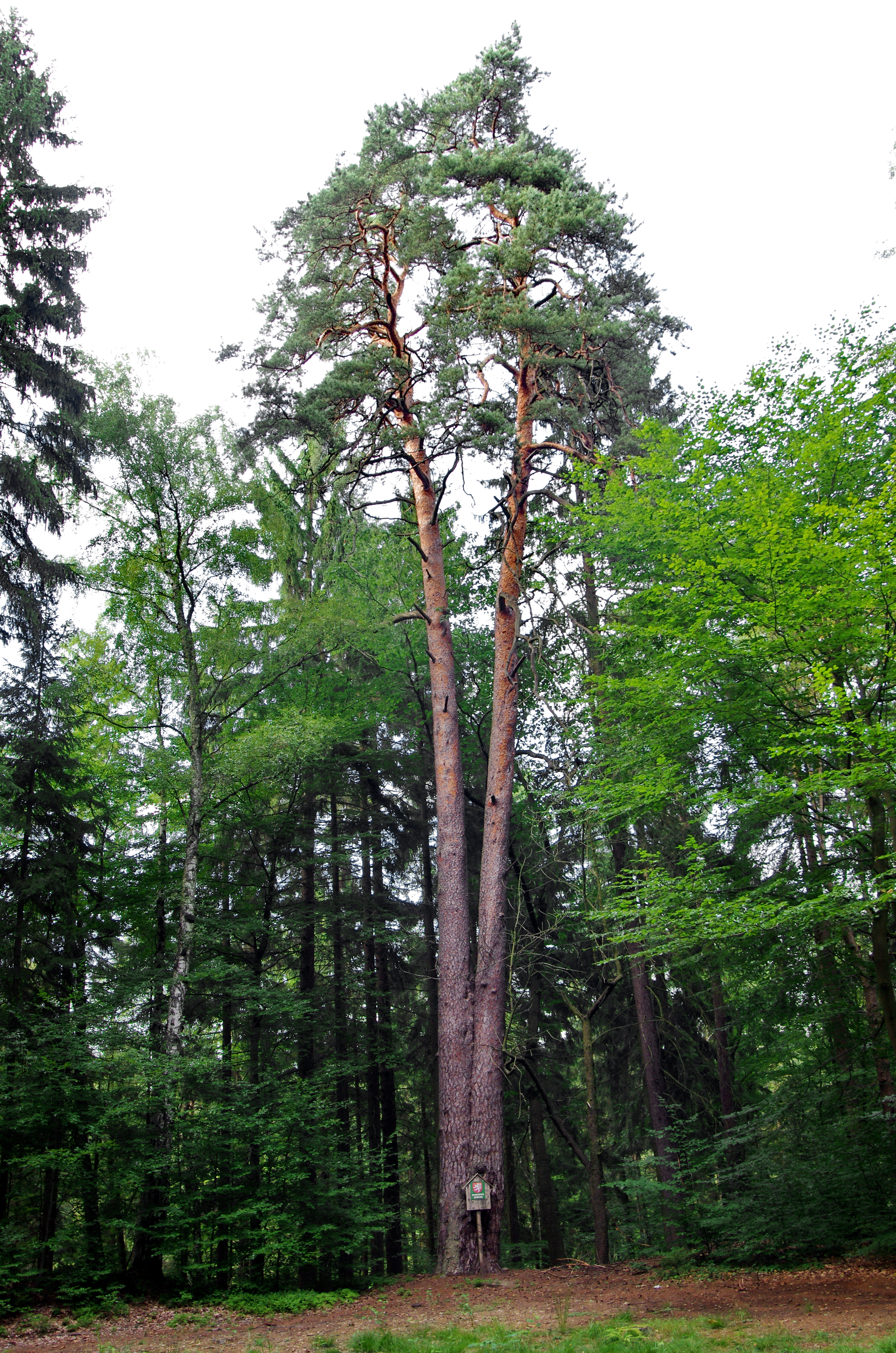 památný strom - borovice u Hartenberku, okres Sokolov